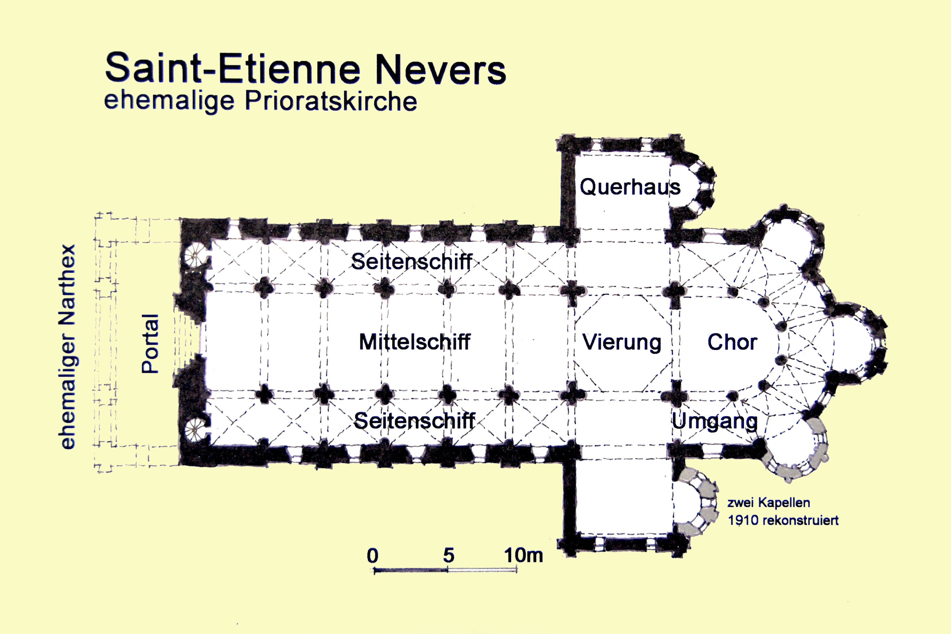 Saint-Etienne_Nevers, Grundriss, Handskizze